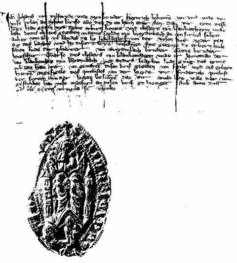 Erste urkundliche Erwähnung Lüdersdorfs (Bebra)